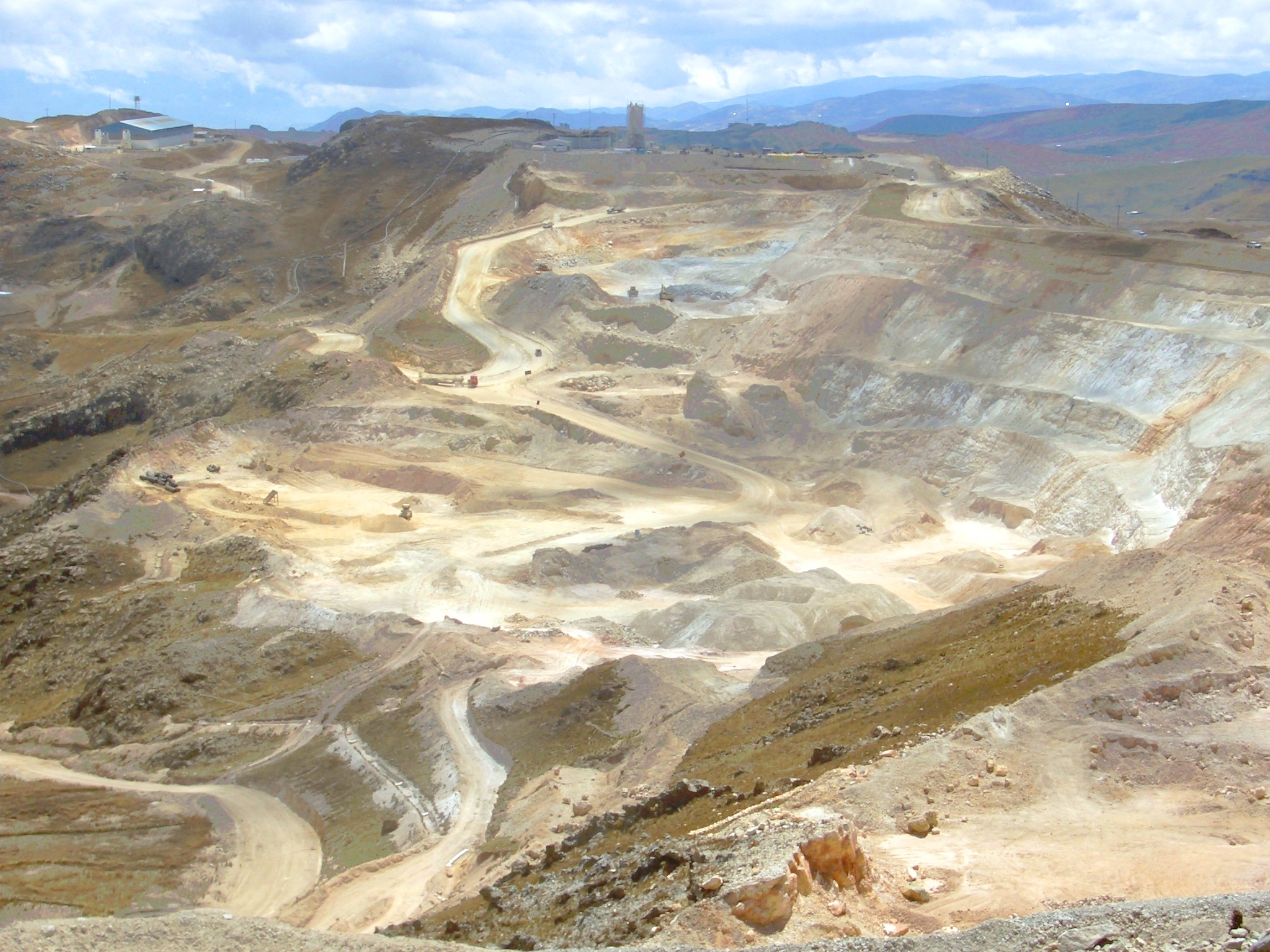 Gold-mine "Yanacocha" bei/ near Cajamarca (Peru)